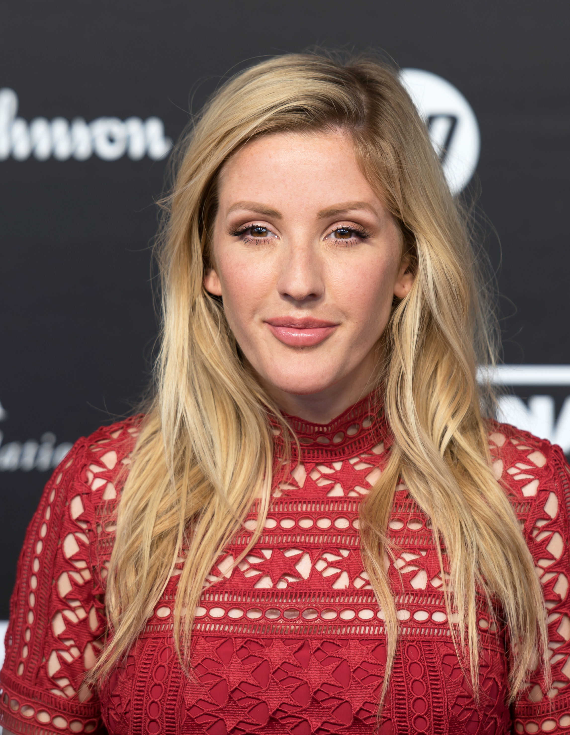 Ellie Goulding beim Global Citizen Festival in Hamburg